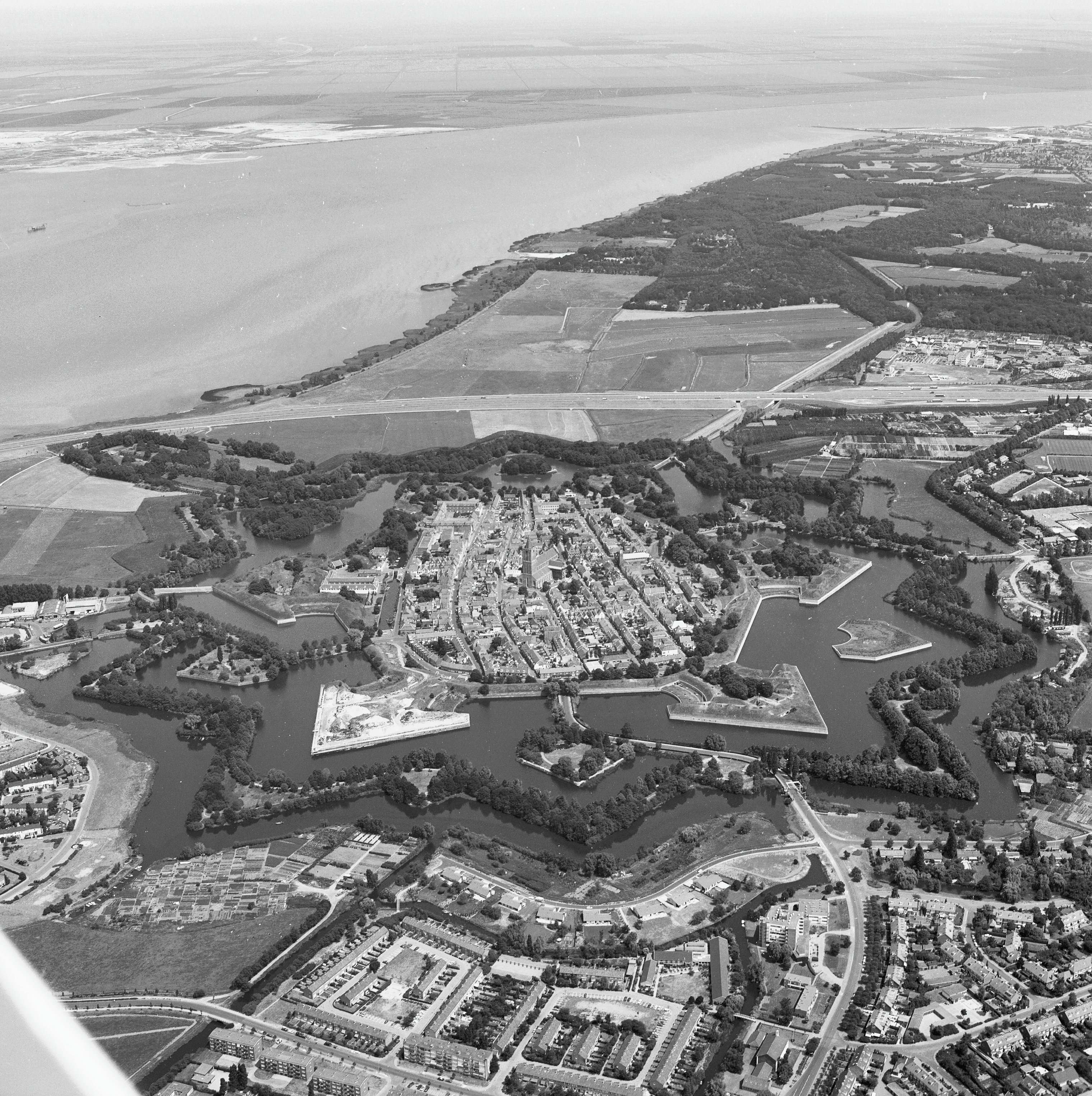 Luchtfoto's